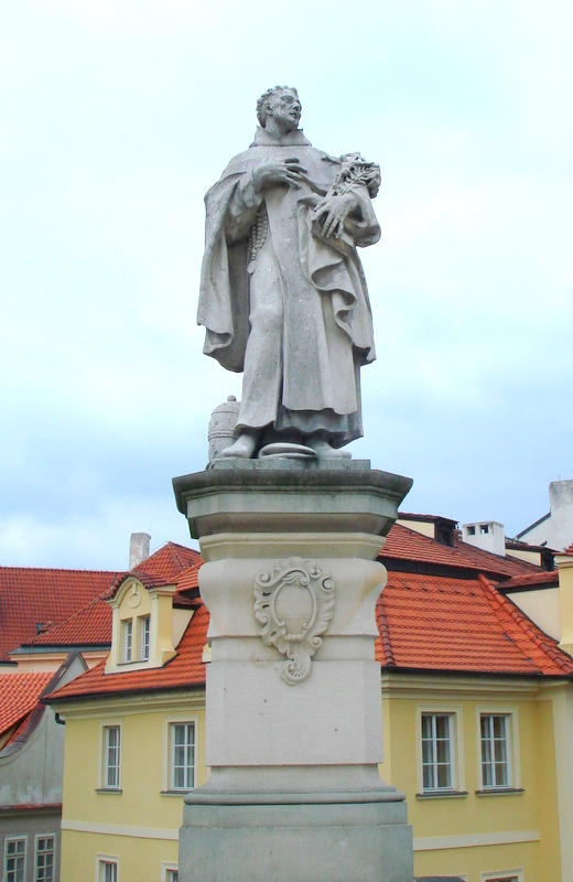 Karlův most, Staré Město a Malá Strana, mezi Křižovnickým náměstím a Mosteckou